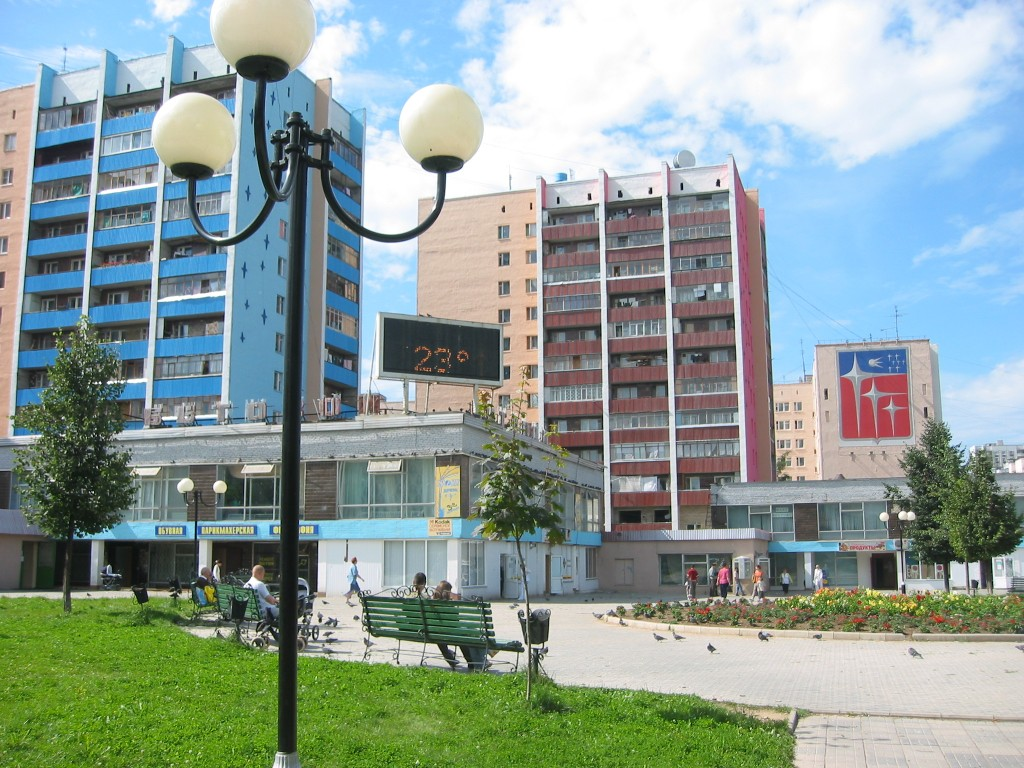 Rue Krasnoznamennaya à Krasnoznamensk Photo prise le 18 août 2004 par Bardovskii